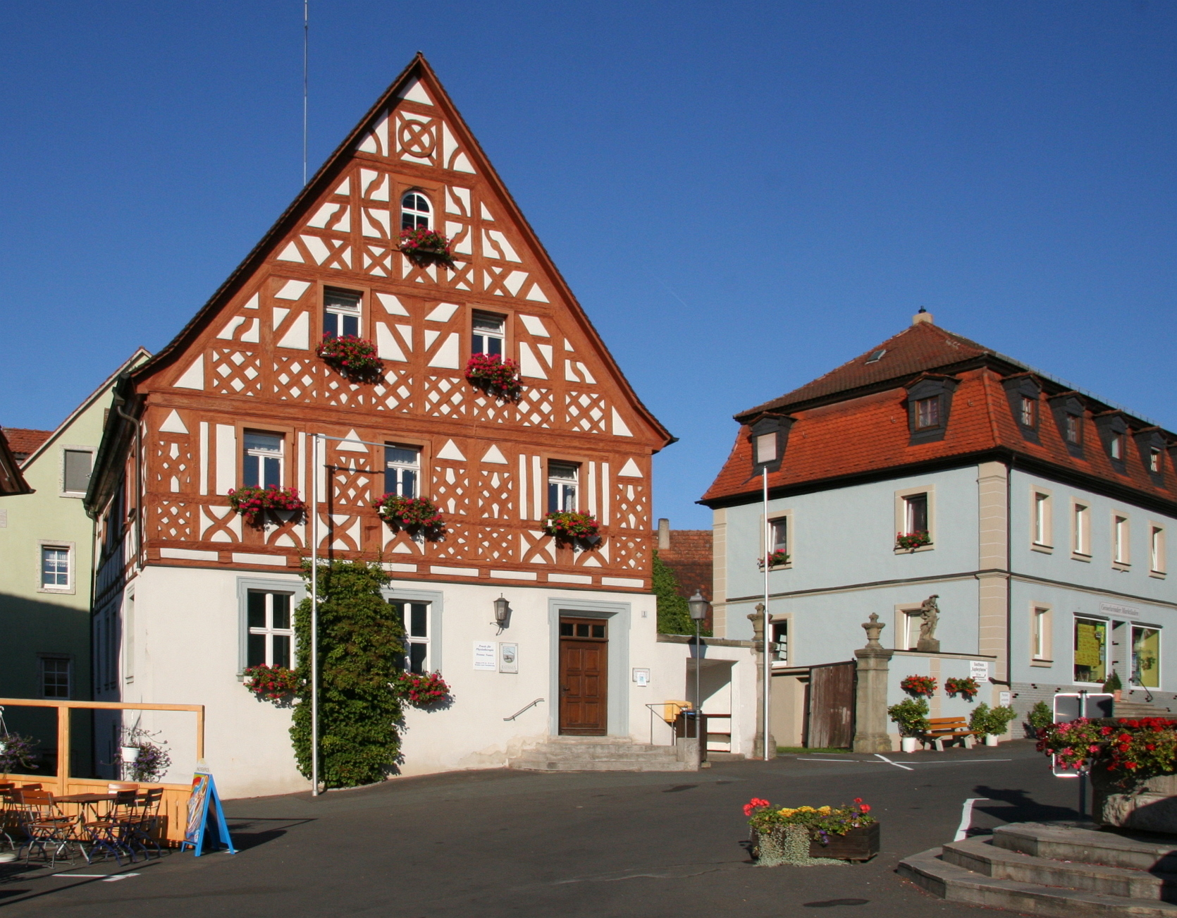 Rathaus in Geiselwind